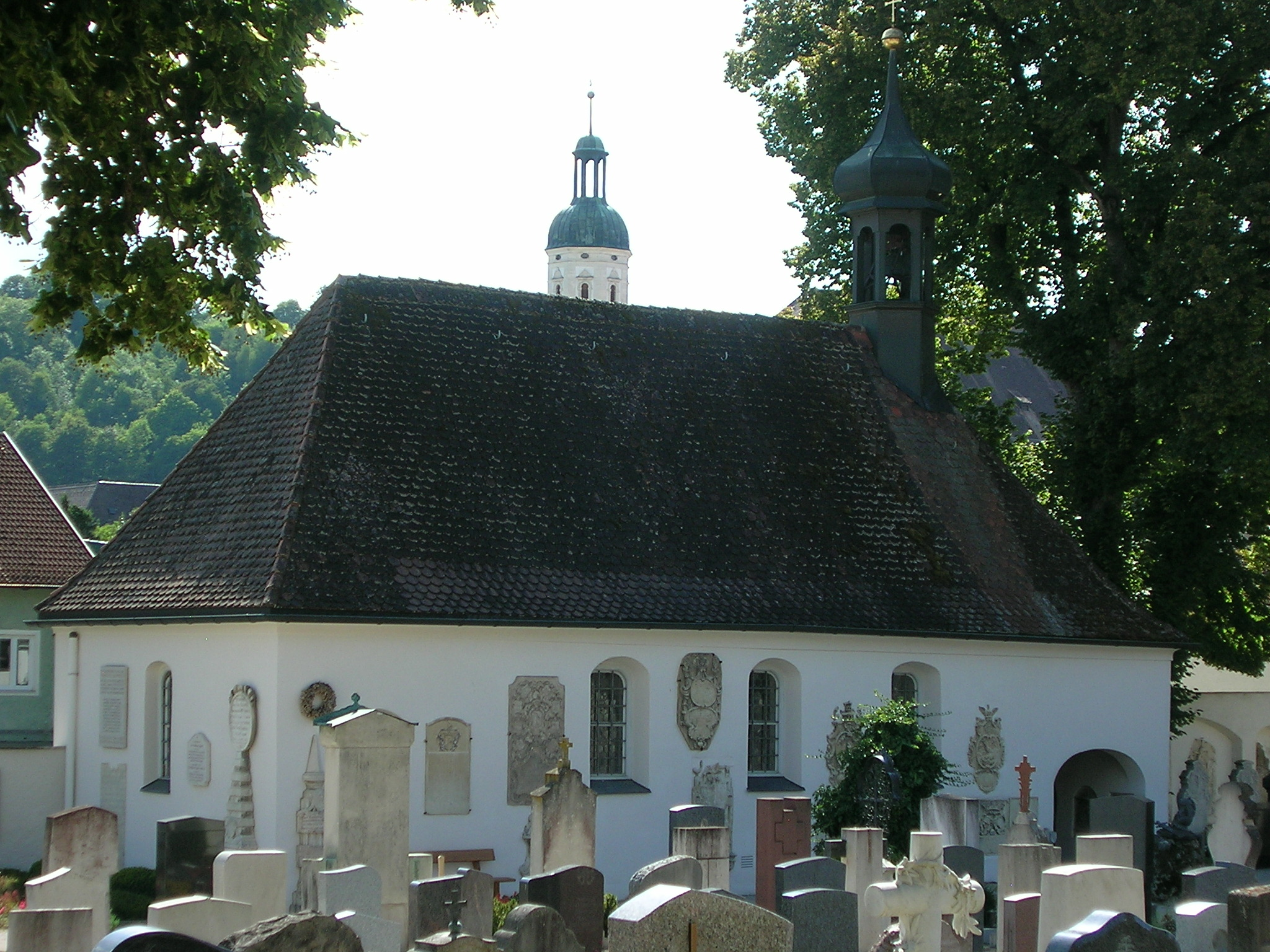 Ostenfriedhof Eichstätt: Blick zur Kapelle Maria Schnee.